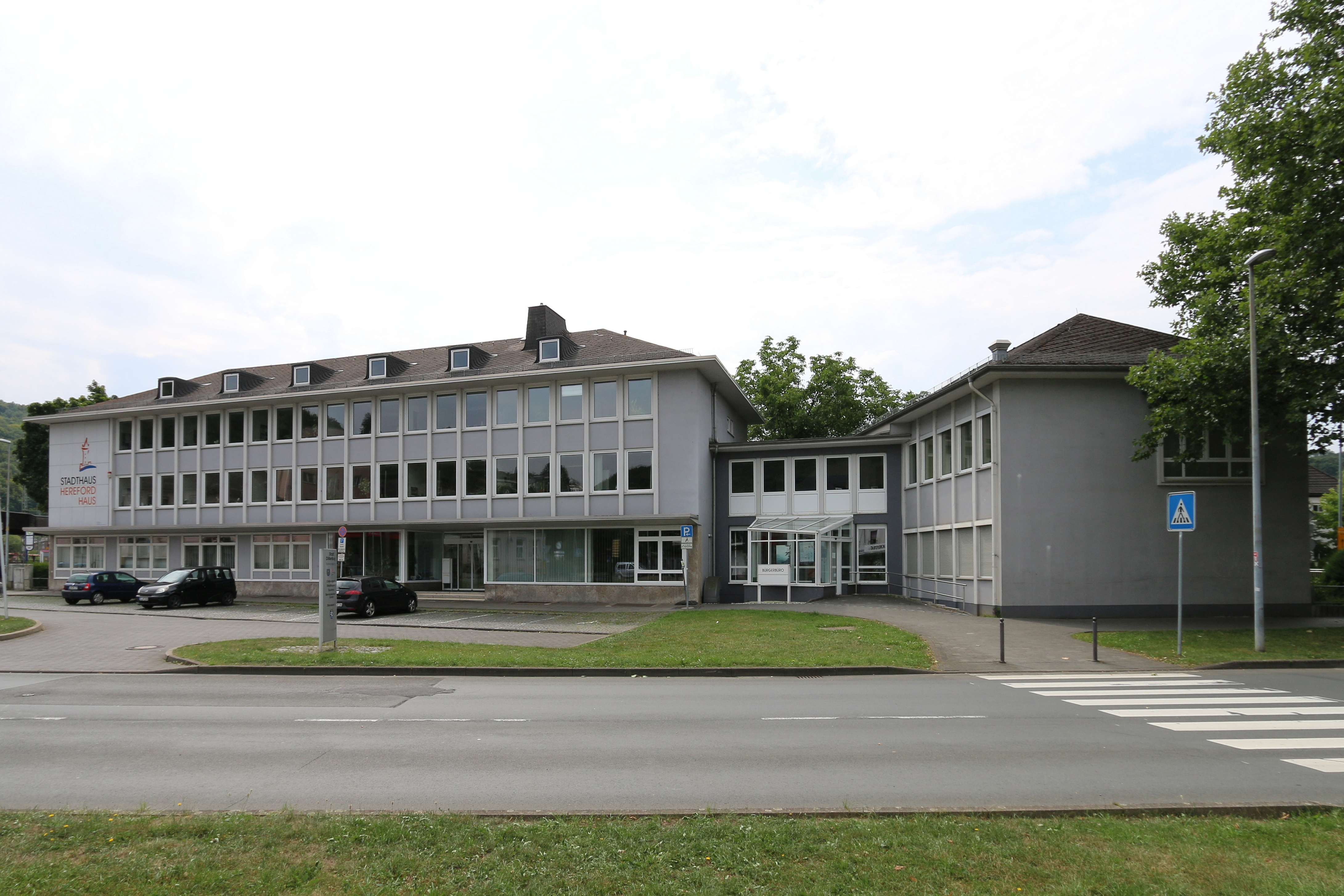 Dillenburg, Lahn-Dill-Kreis: Gebäude der Stadtverwaltung am Bahnhofsplatz 1